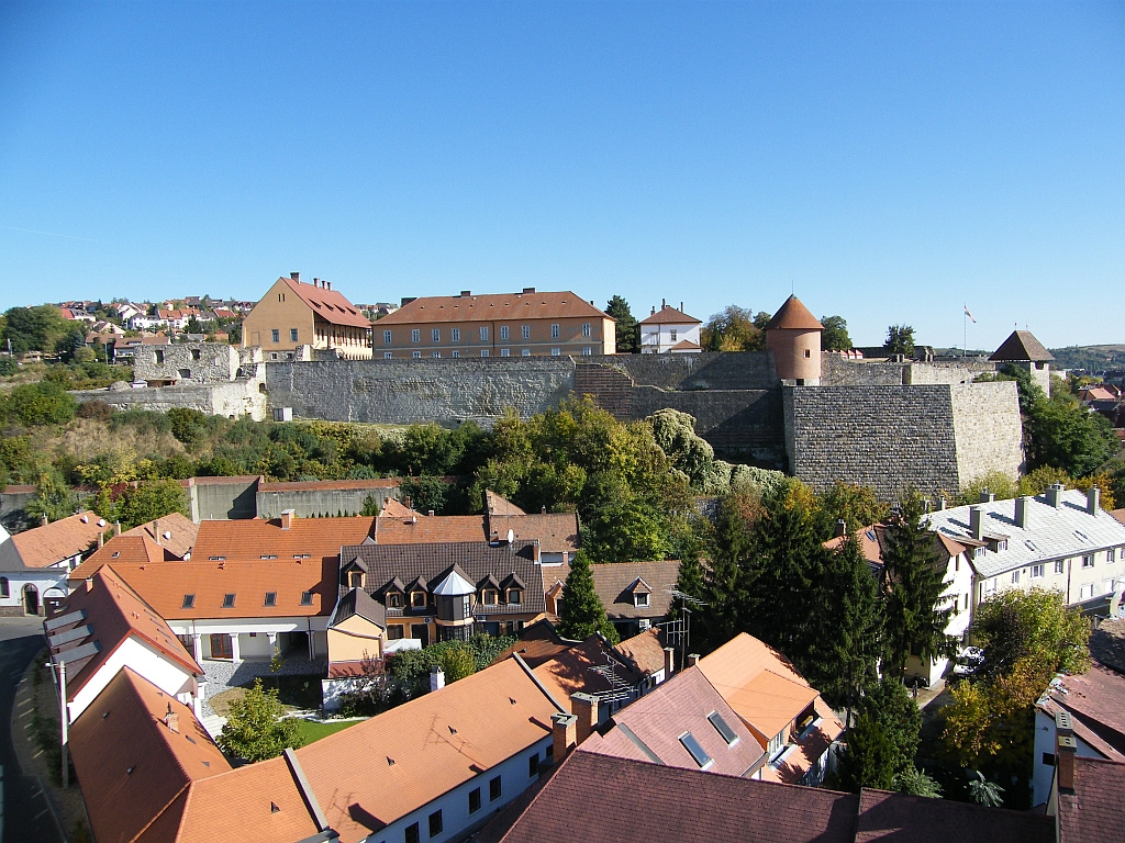 Erődrendszer romjai (Eger, Szervita utca, Dobó István utca, Bástya utca, Vécsey Sándor utca) This is a photo of a monument in Hungary, Identifier: 17237